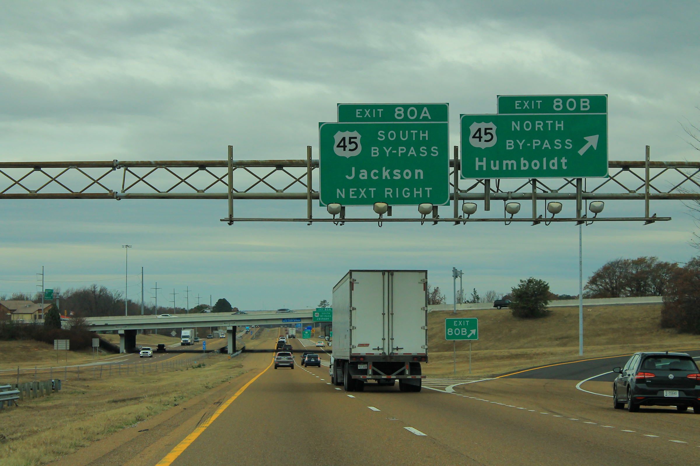 I-40 West - Exit 80AB - US45 Bypass